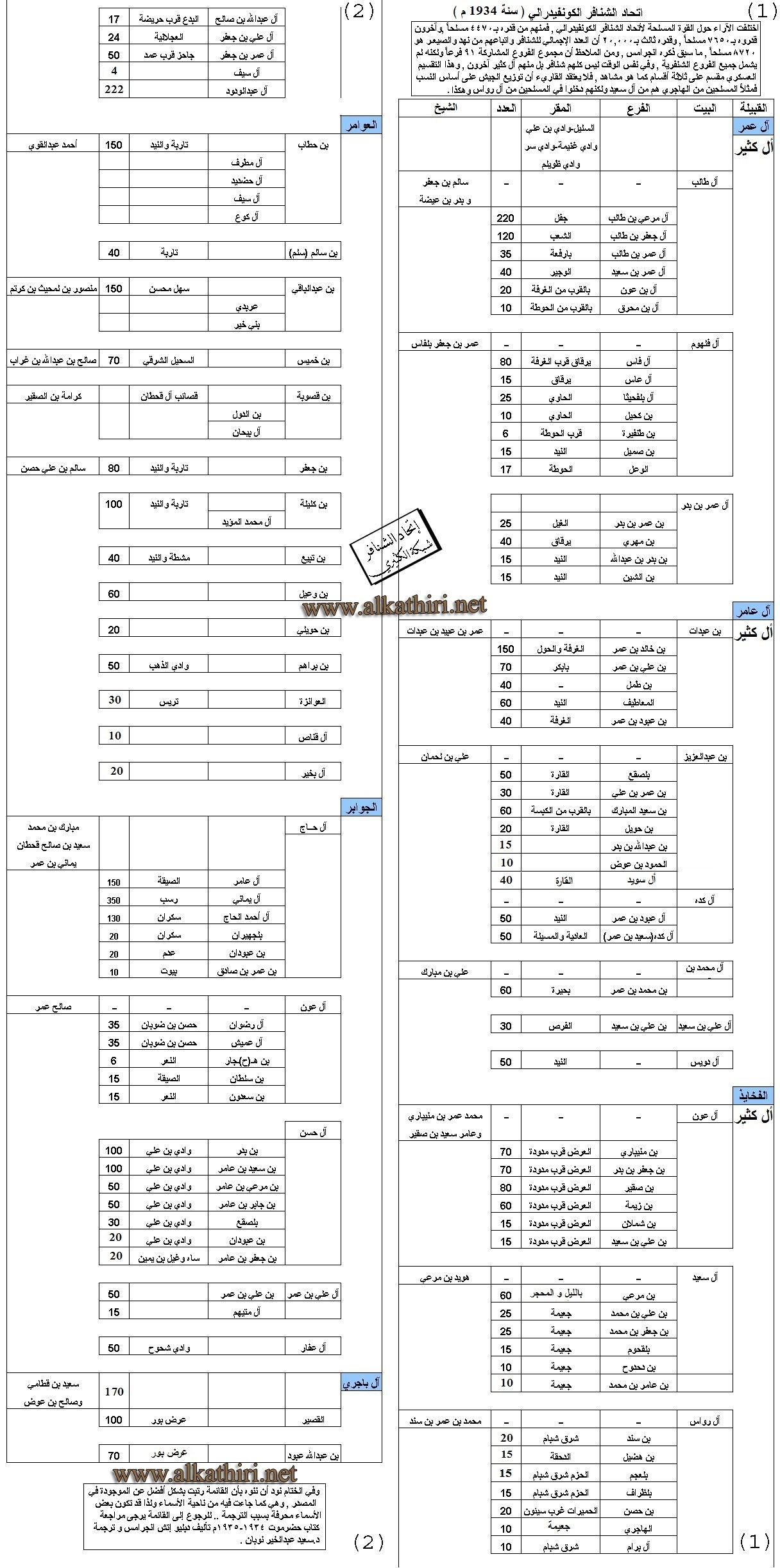 أتحاد الشنافر الكونفدرالي في حضرموت سنة 1934 م بتسعة ألف مسلح و مقاتل و قبيلة الشنافر